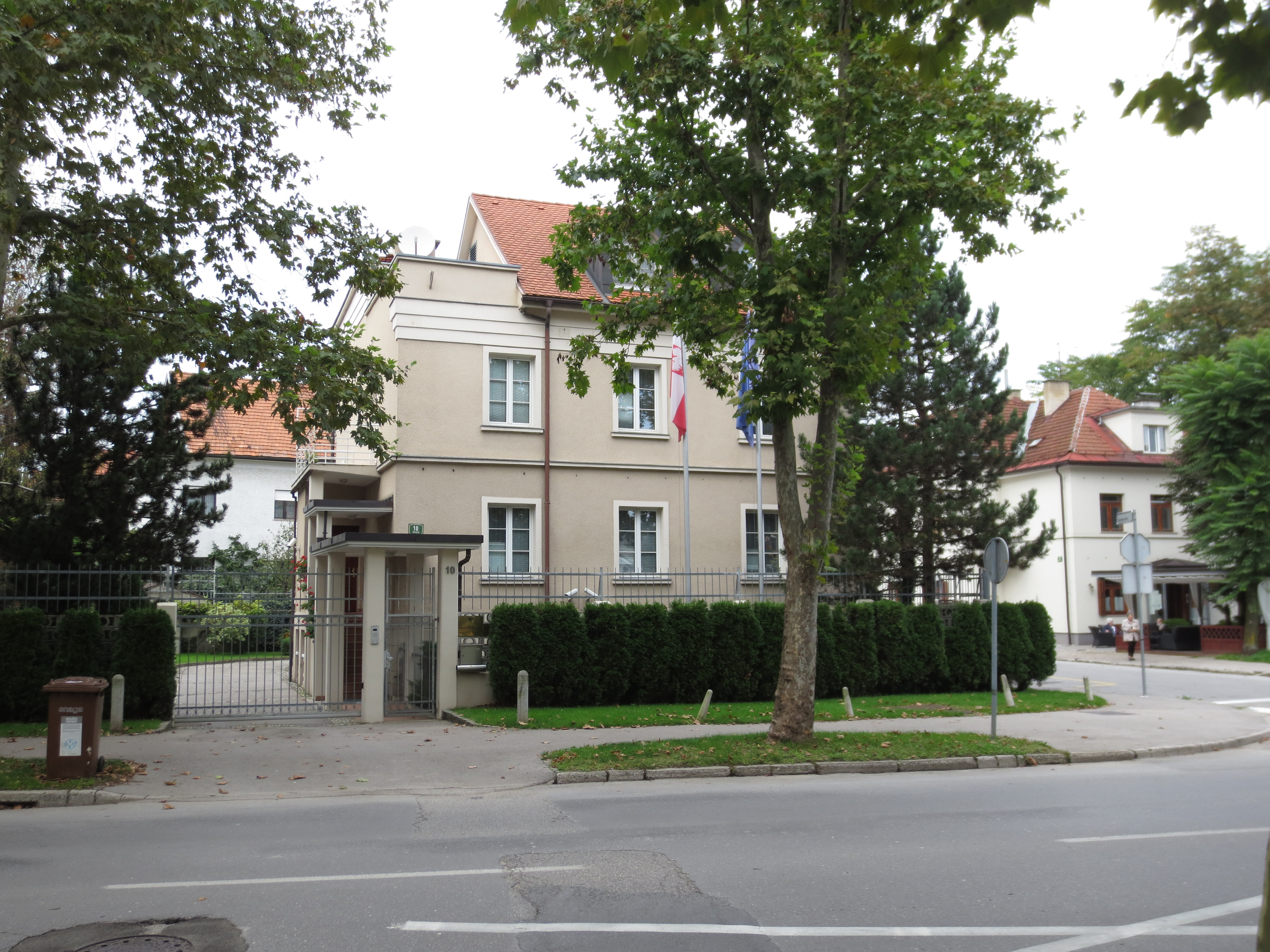 Poljska ambasada